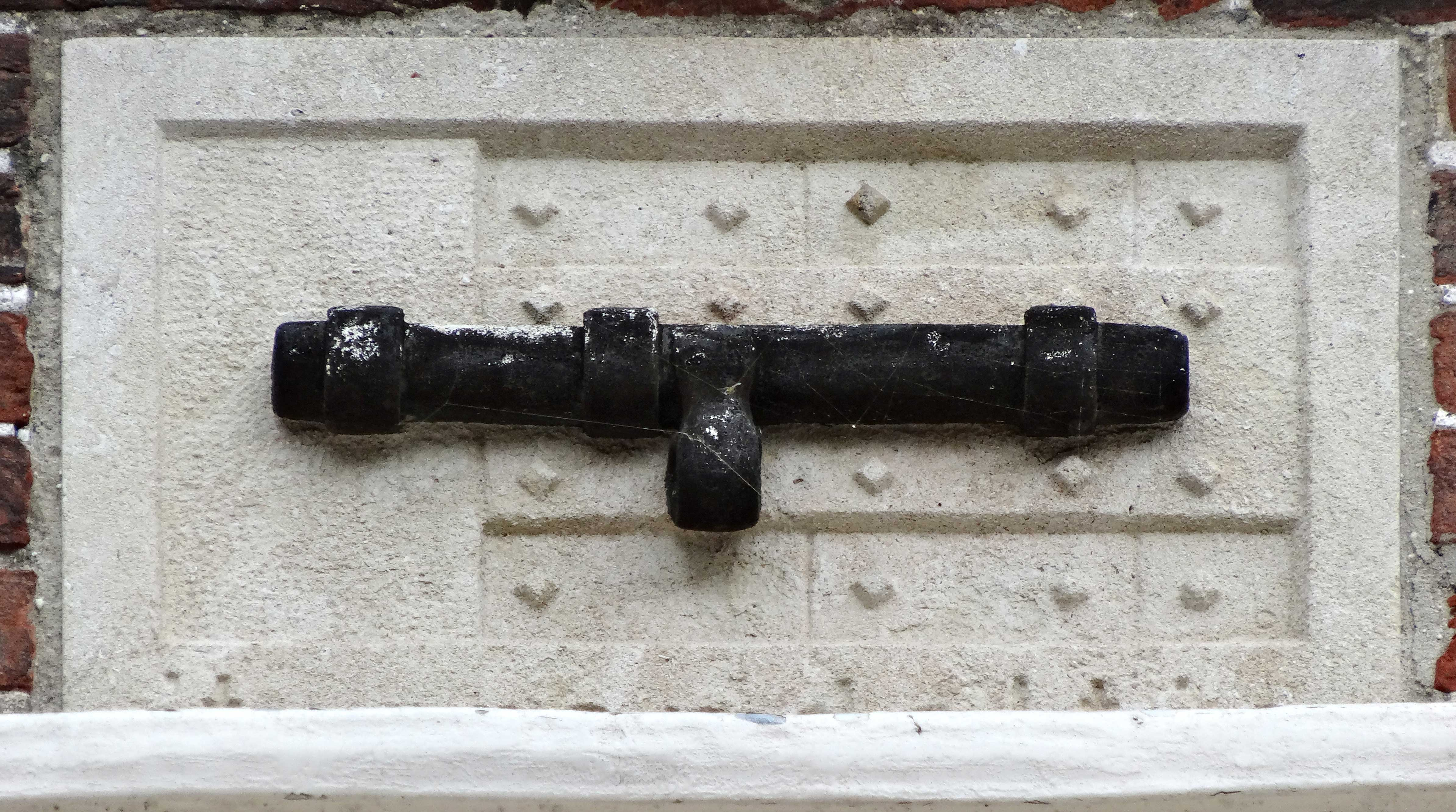 Gevelsteen gemaakt door Cees Broehs met 't Grendeltje Lange Tiendeweg 21 Gouda, rijksmonument